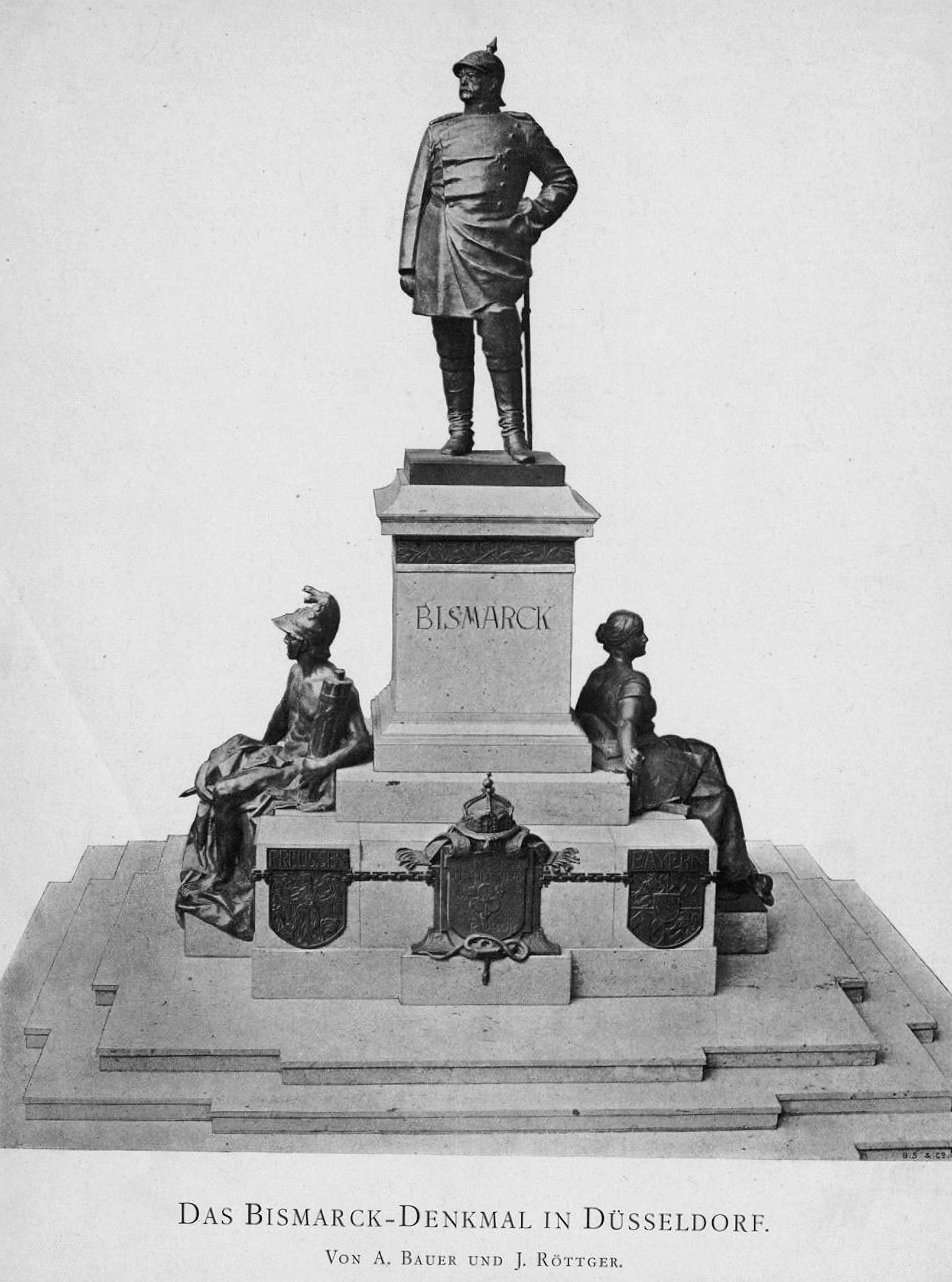 Das Bismarck-Denkmal in Düsseldorf von August Bauer und Johannes Röttger (1899)